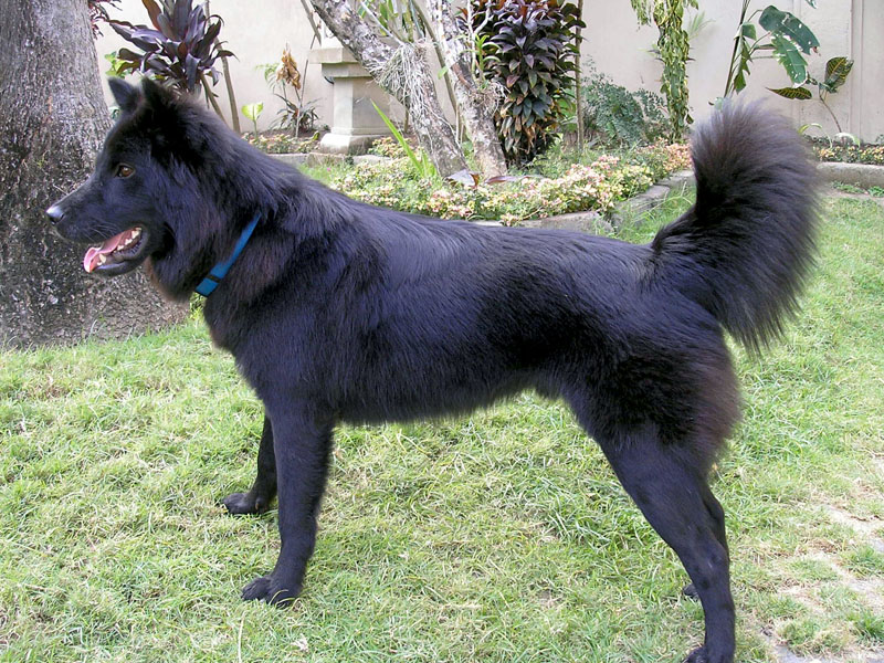 Kintamani dog